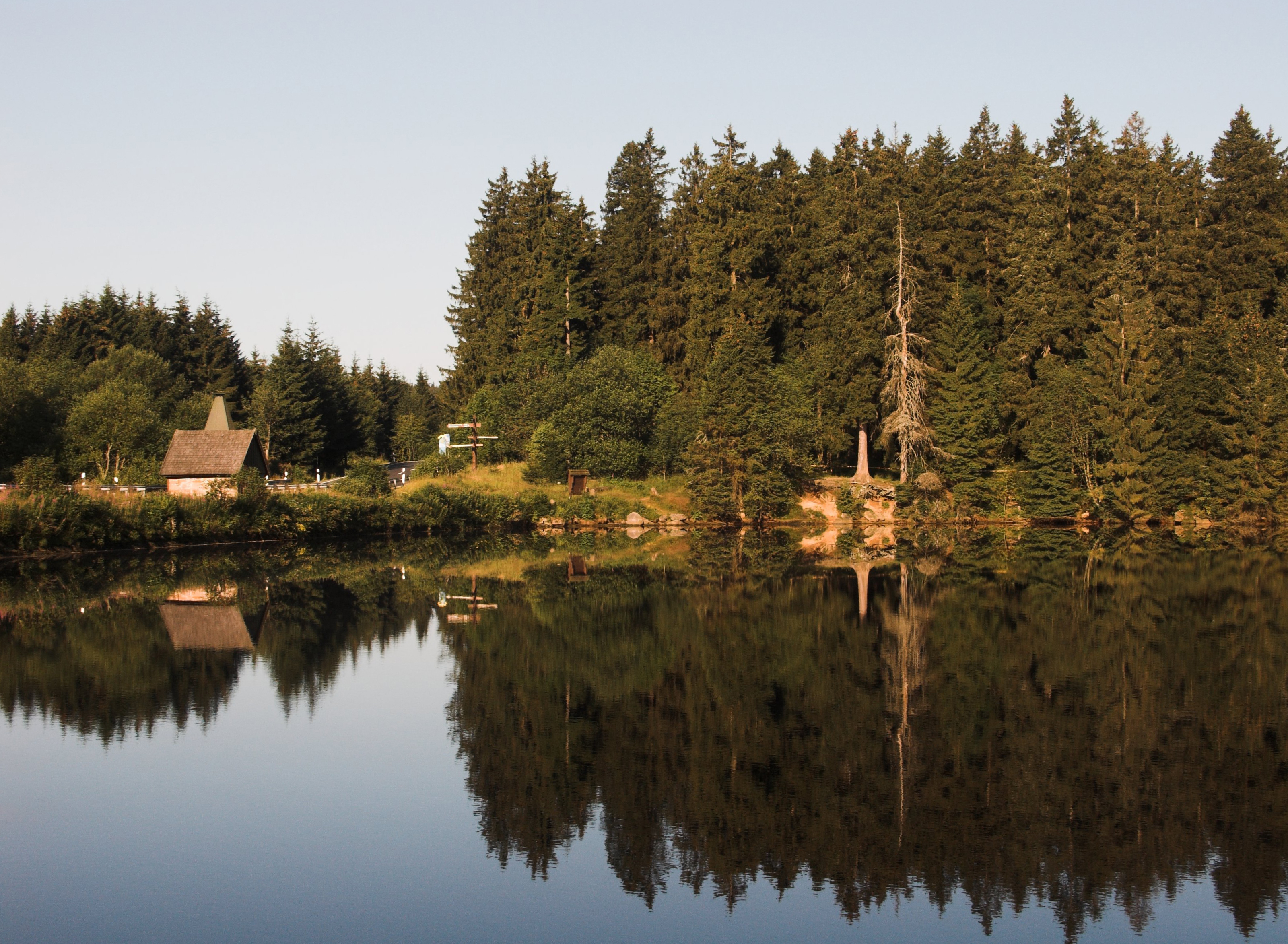 Südwestseite des Oderteichs mit dem Striegelhäuschen